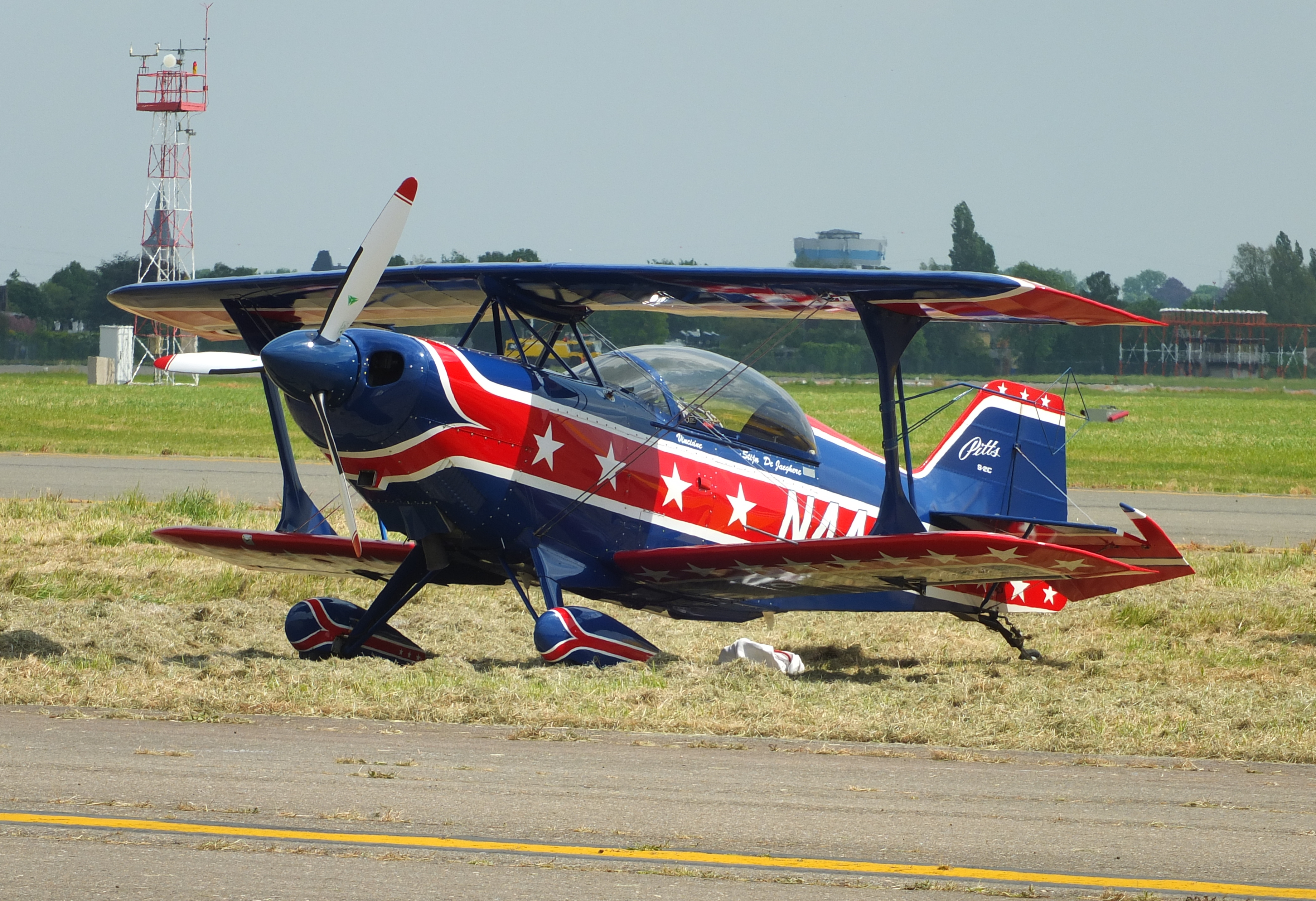 Pitts S-2C Special N44QQ (c/n 6034) op de Stampe Fly In 2015.